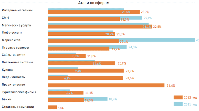 DDoS-атаки на различные сферы